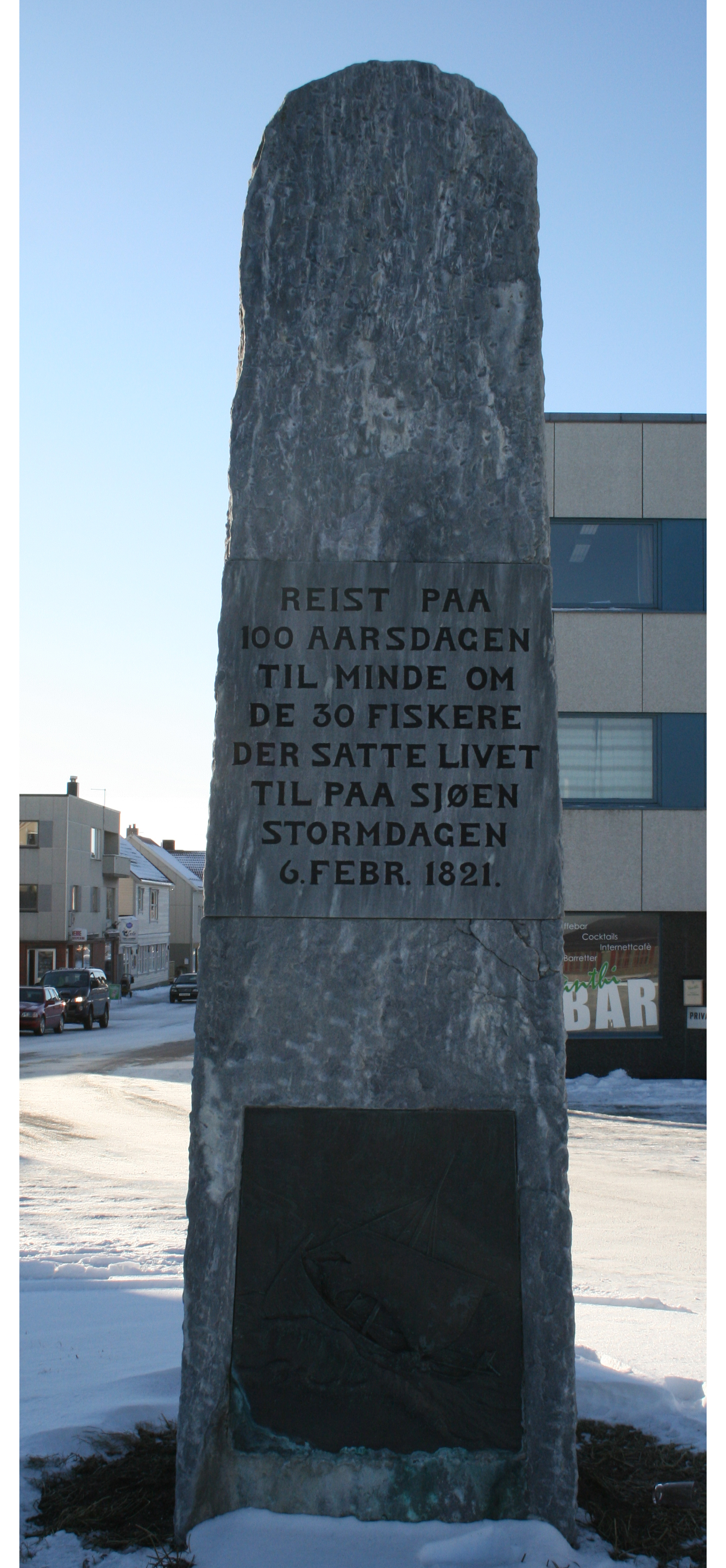 Minnesmerke i Andenes sentrum over 30 fiskere som omkom i storm 6. februar 1821